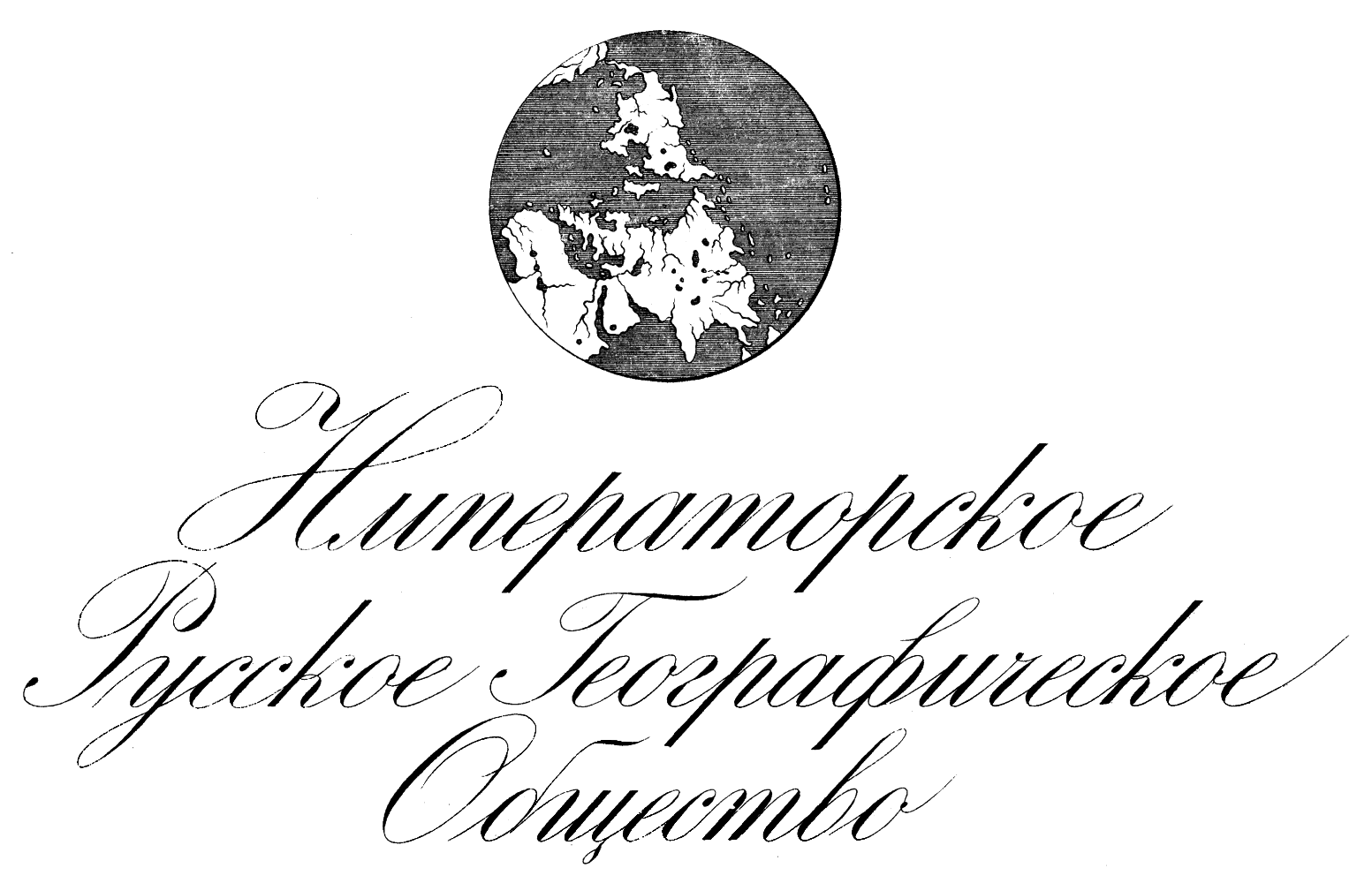 Эмблема - Императорское Русское Географическое Общество, 1915.